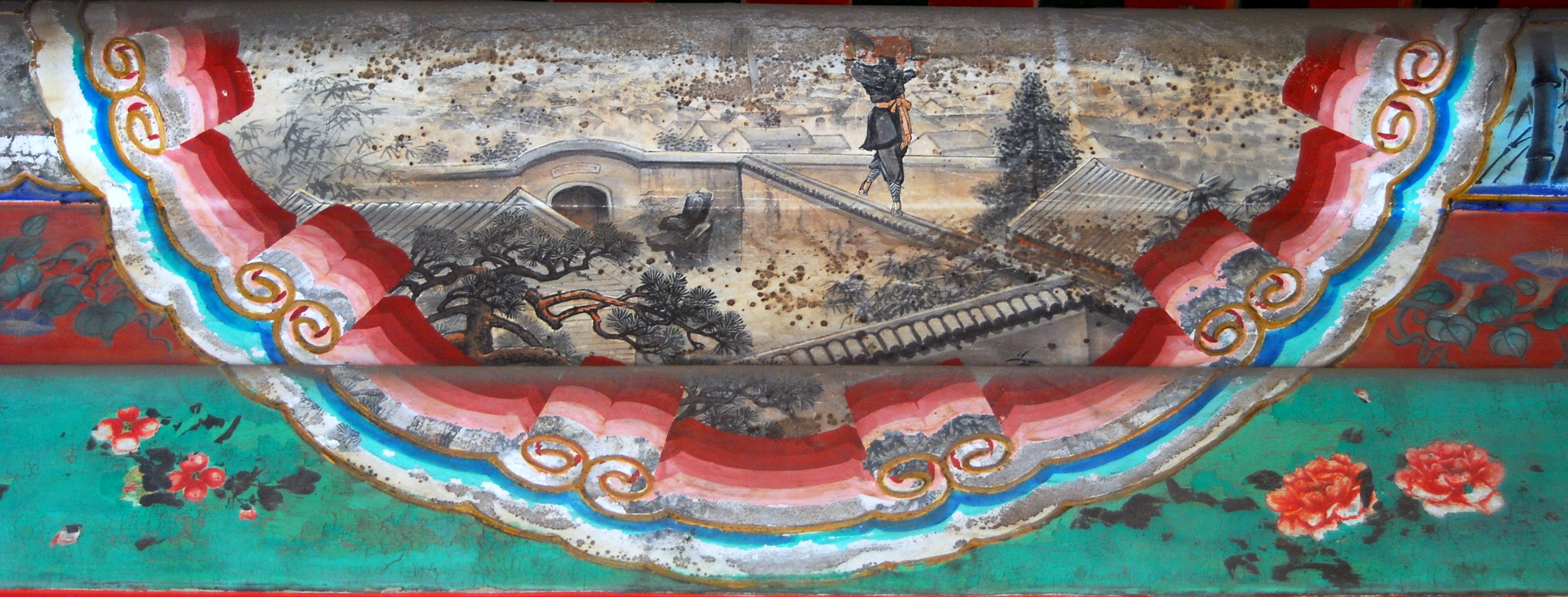 颐和园长廊上的彩绘：时迁盗甲